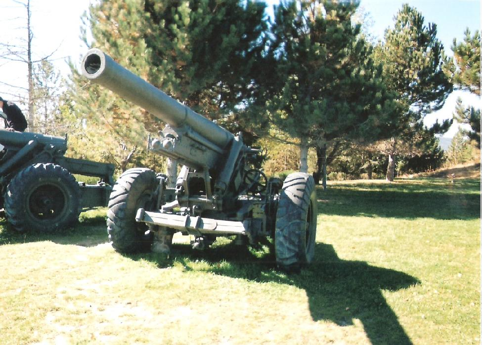 Kütahya-Zafertepe Şehitliği